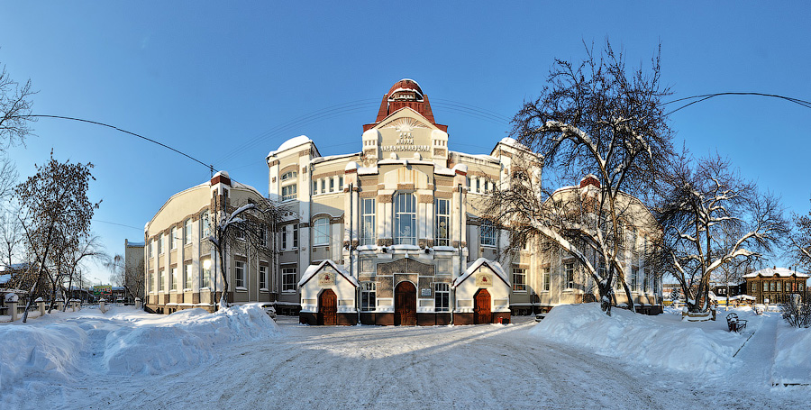 Дом Науки Микушина П. И. (Томская область, Томск, Соляная площадь, 4)